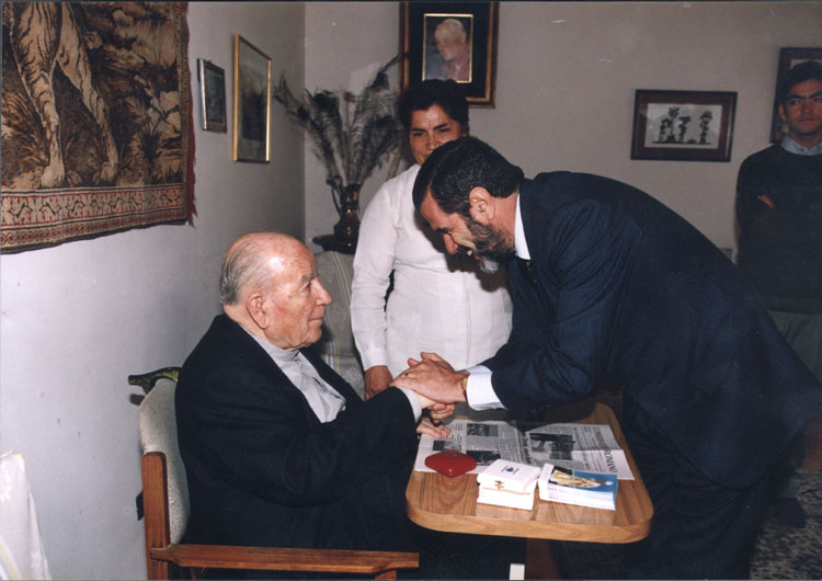 Visita al Cardenal Raúl Silva Henríquez.